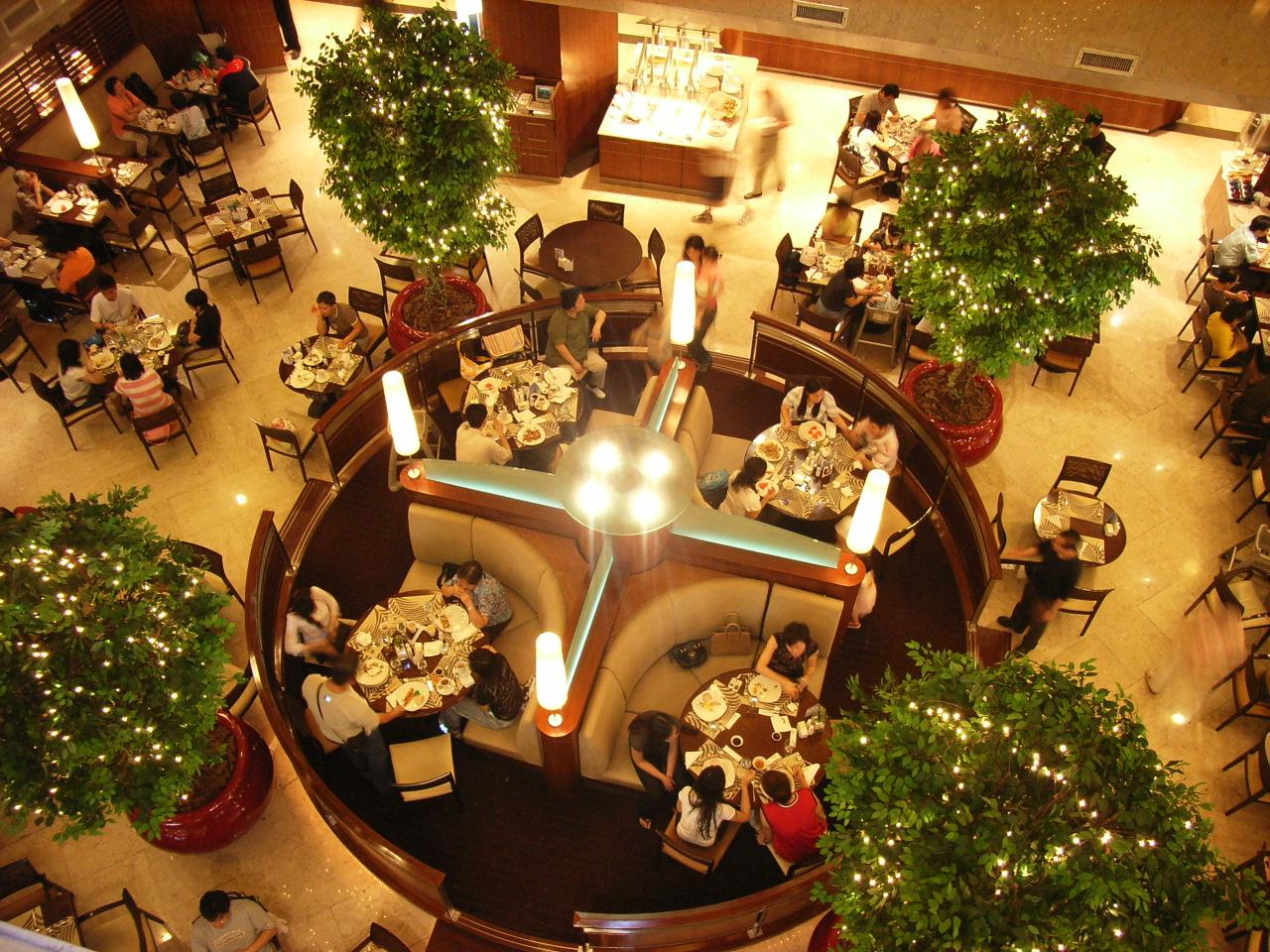 Tsim Sha Tsui, Kowloon, Hong Kong Photo by TonySKTO